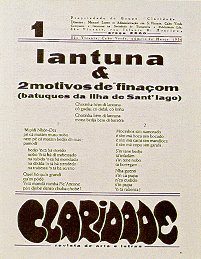 São Vicente, Cabo Verde: Capa do n.º 1 da revista Claridade, Mindelo (1936)